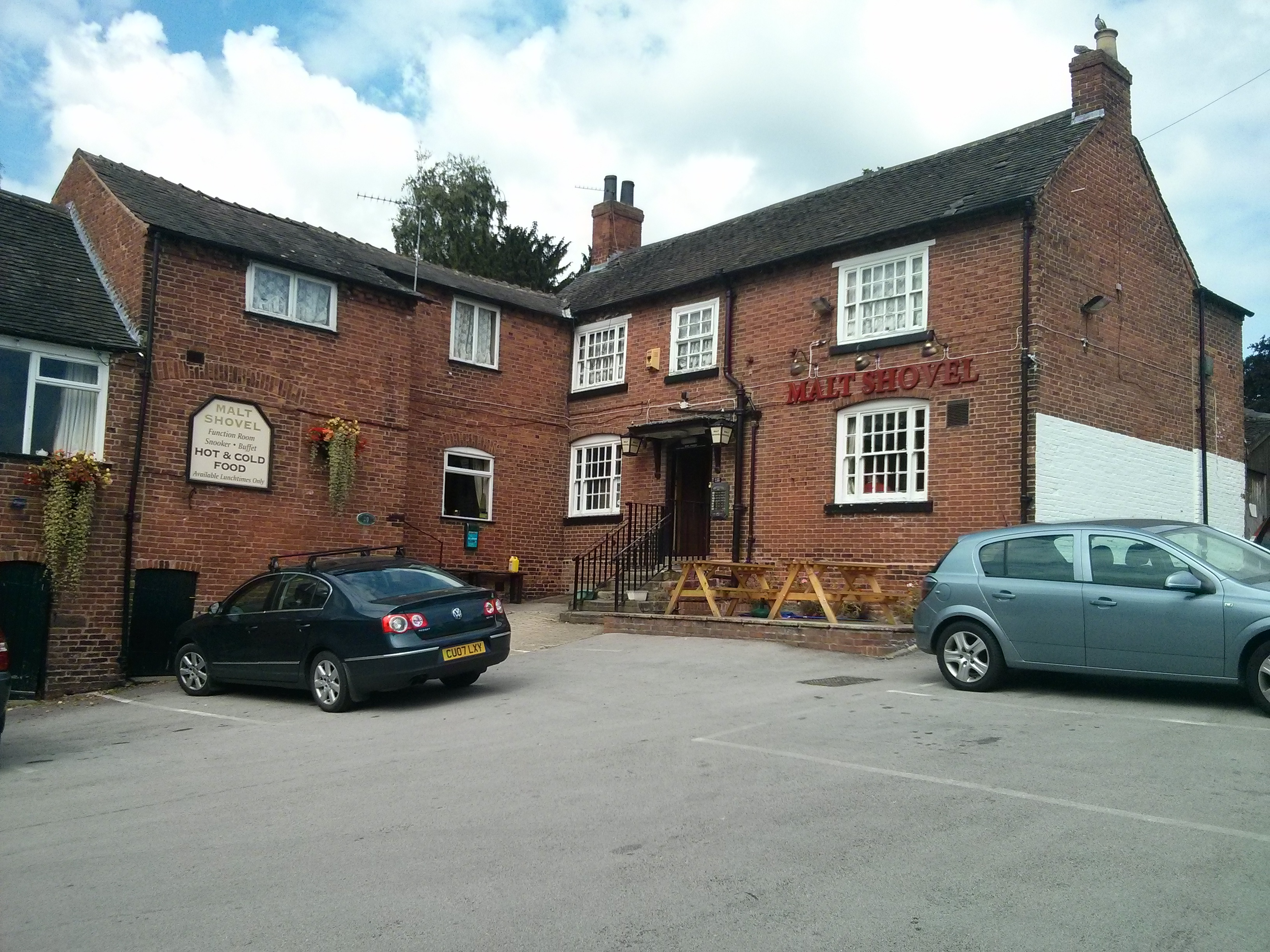 malt in spondon